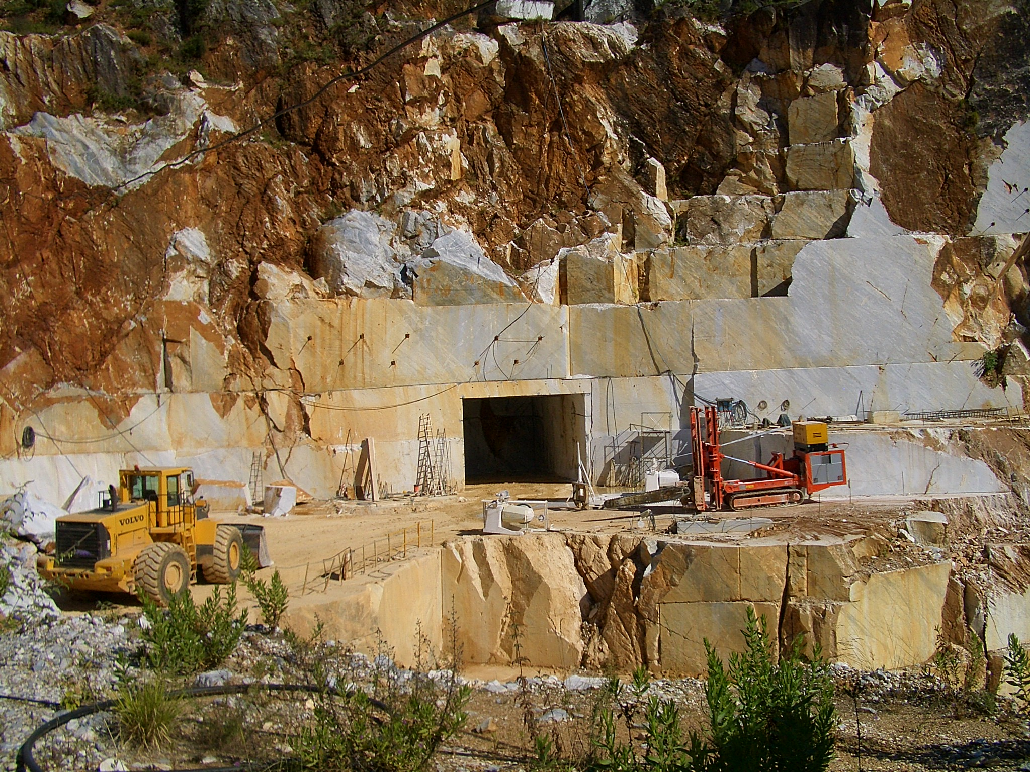 Marble quarries above Carrara, and the road that runs there on the slope of a steep valley, partly in tunnels